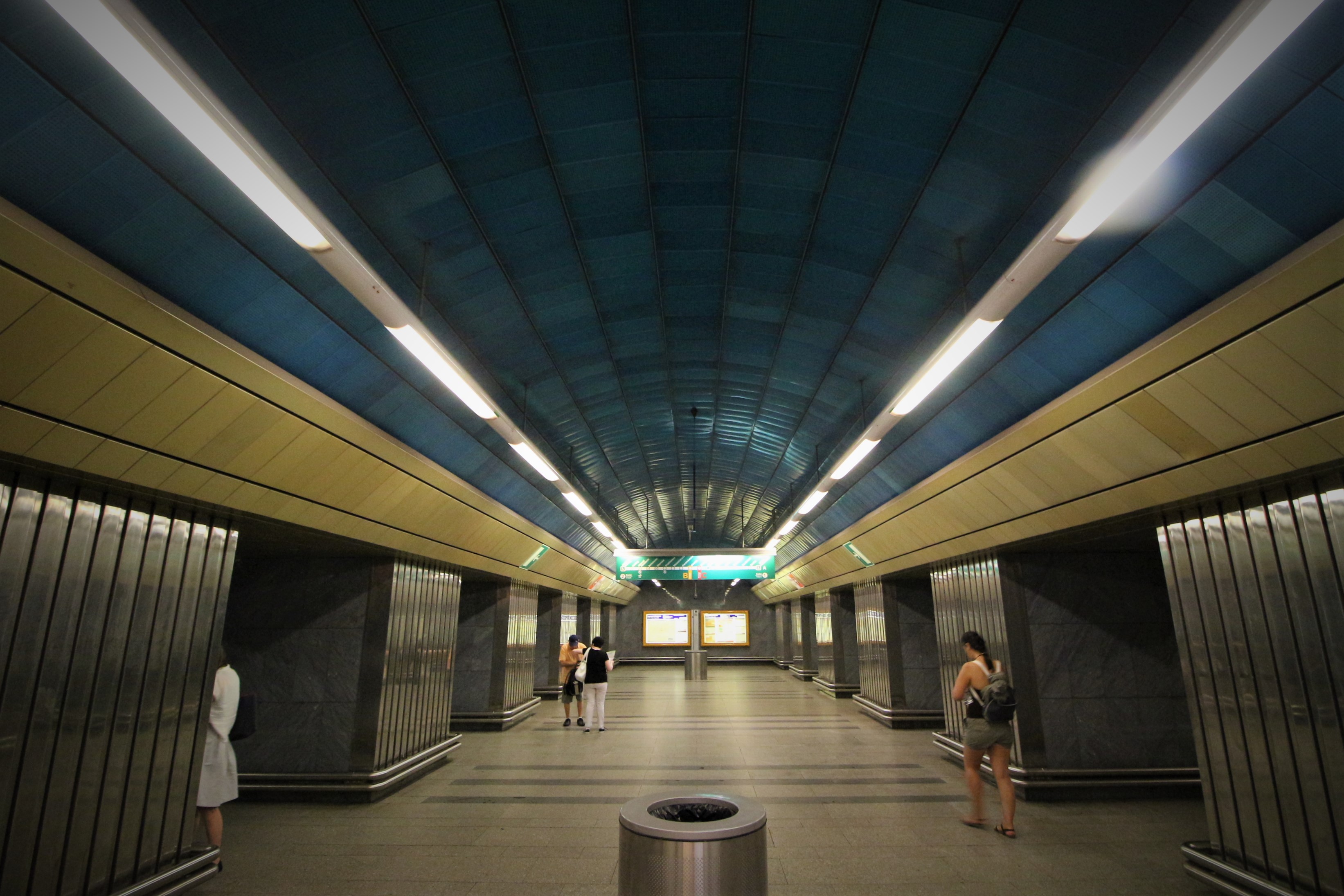 Stanice pražského metra, trasa A, Náměstí Míru